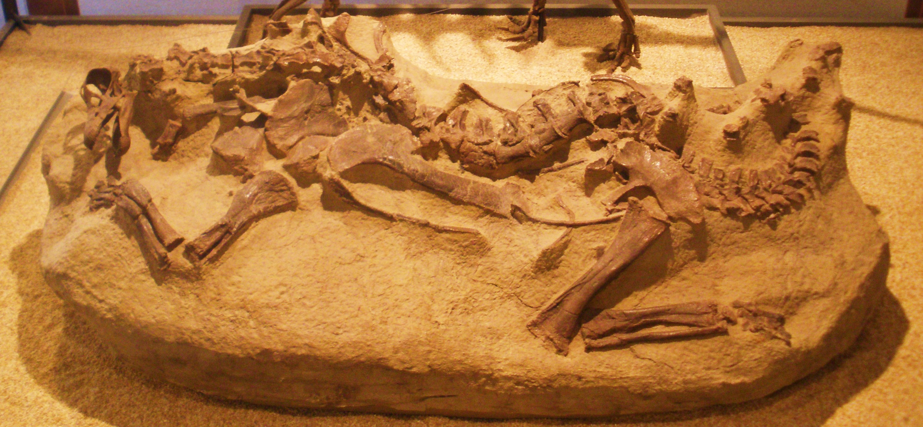 Fossil sauropod, baby (Toni, specimen SMA 0009).